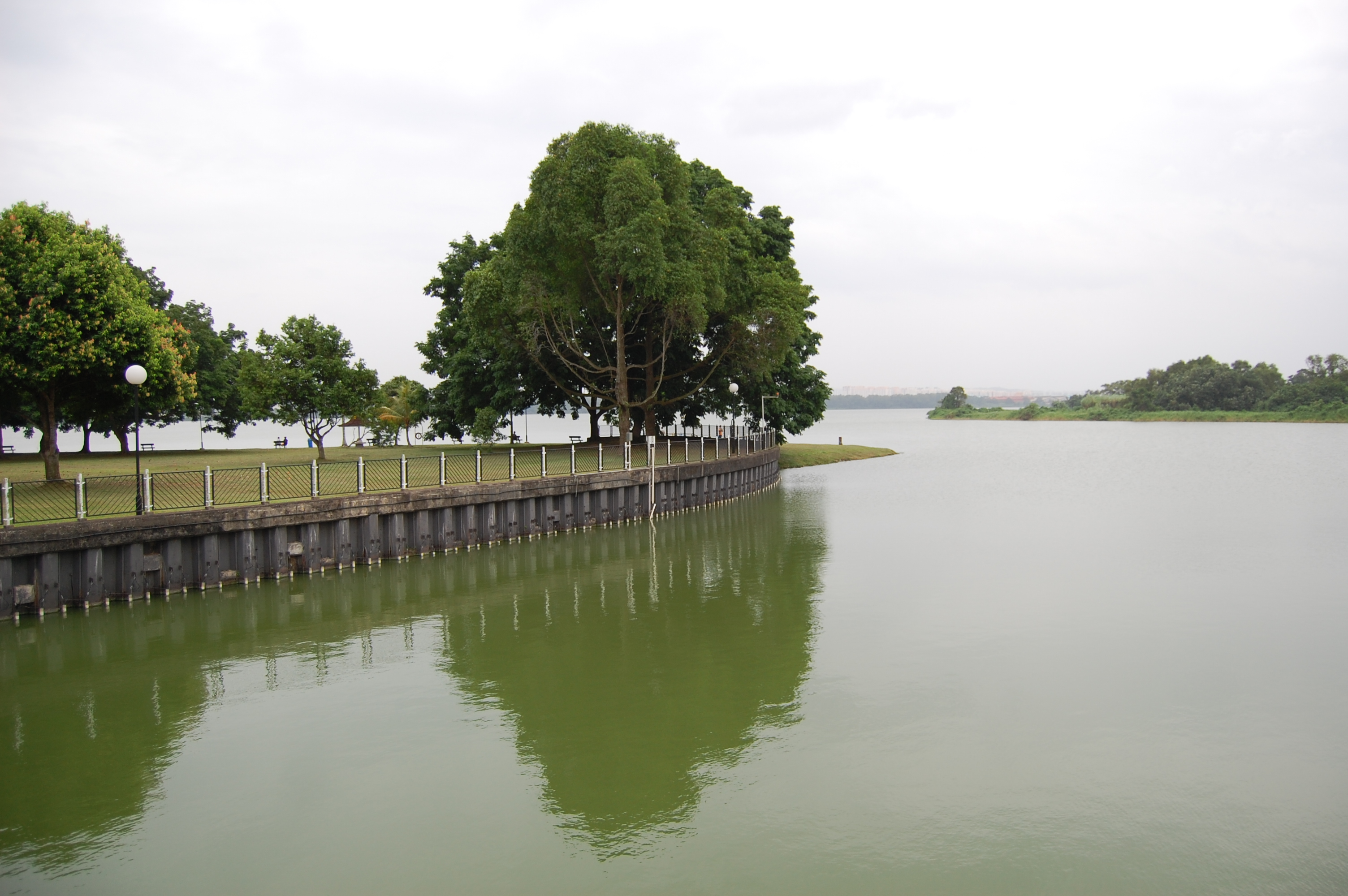 Kranji Reservoir Park